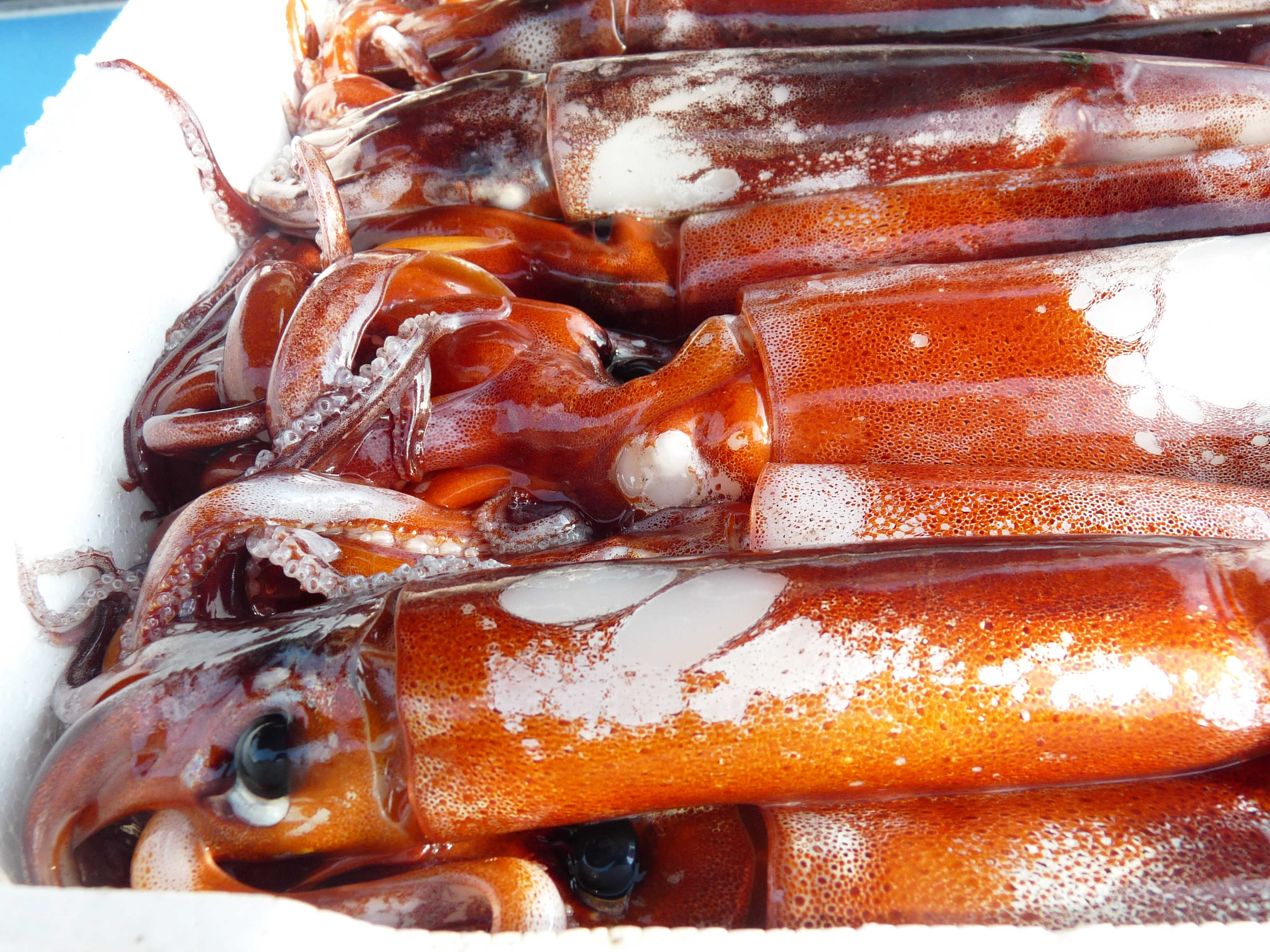 Cageot de calmars dans le port de Lipari (îles Eoliennes, Sicile)